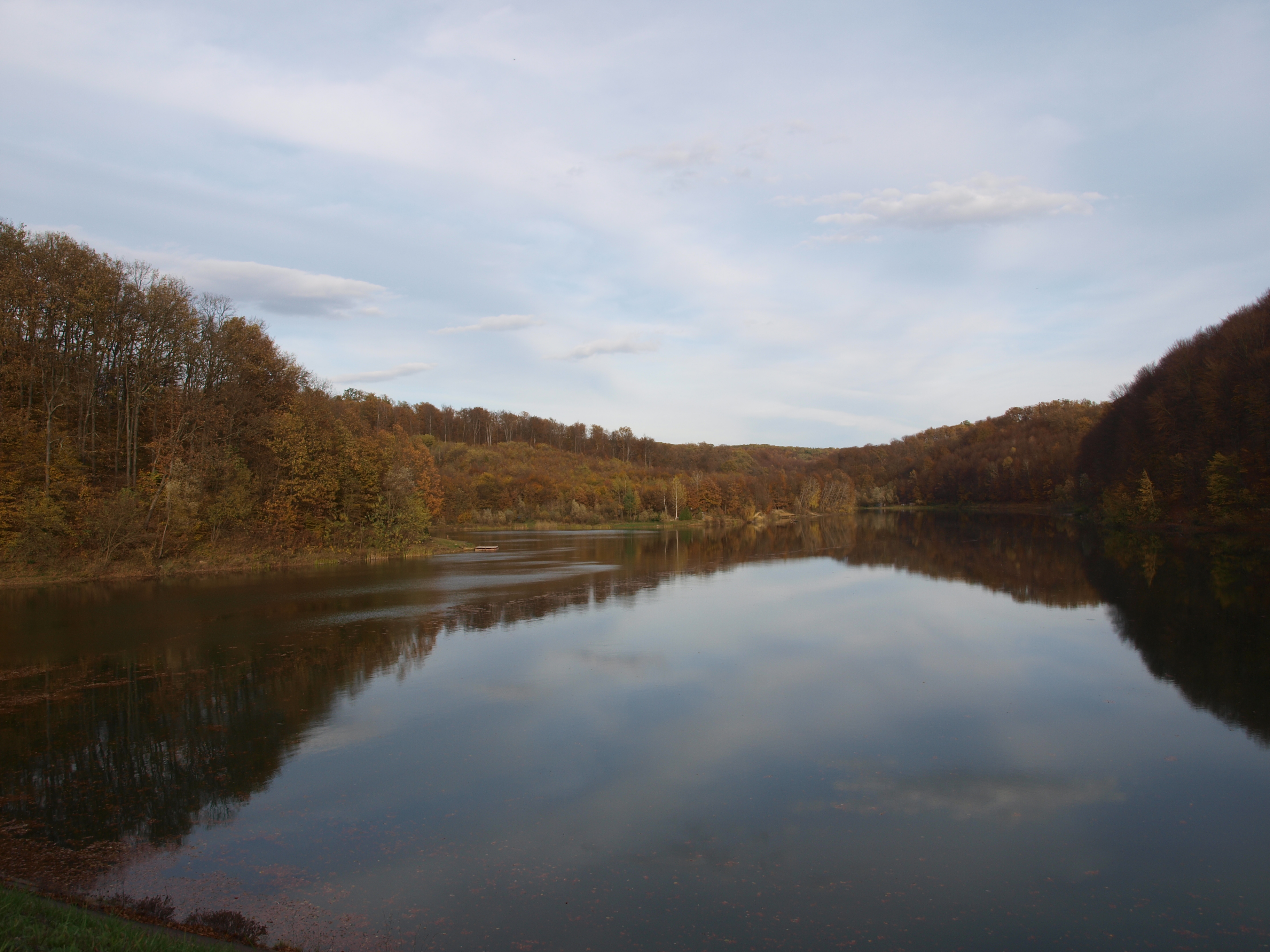 Jezero Petnja u Slavonskom Brodu.